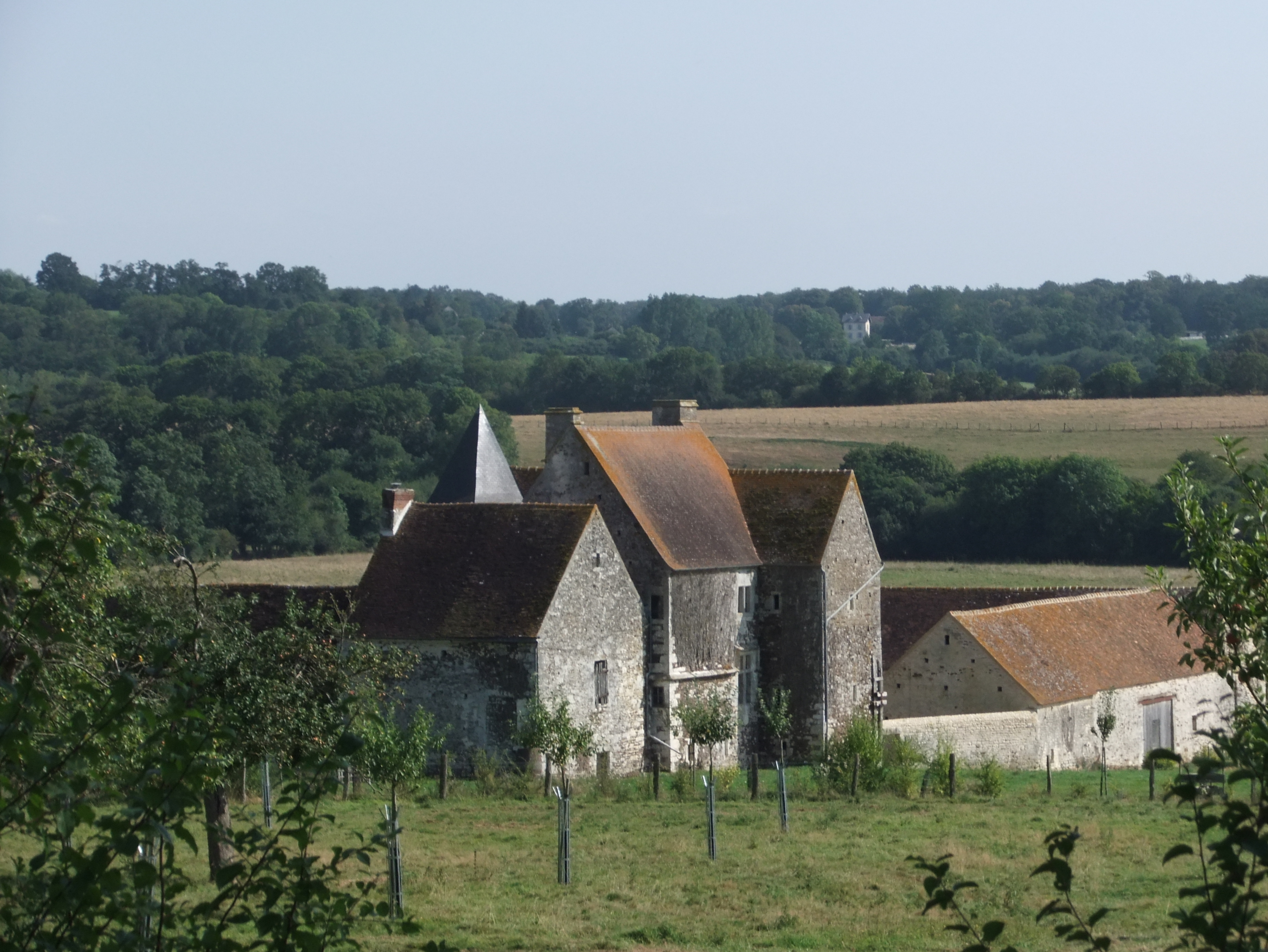 La Courbe (Orne, France), logis (manoir) de la Queurie.